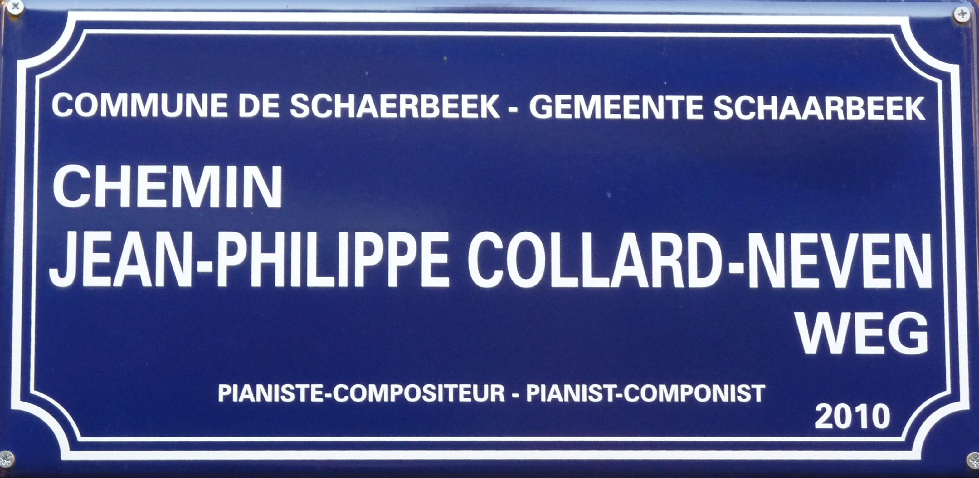 Le Mur des Célébrités à la Maison des Arts de Schaerbeek, Bruxelles, Belgique.